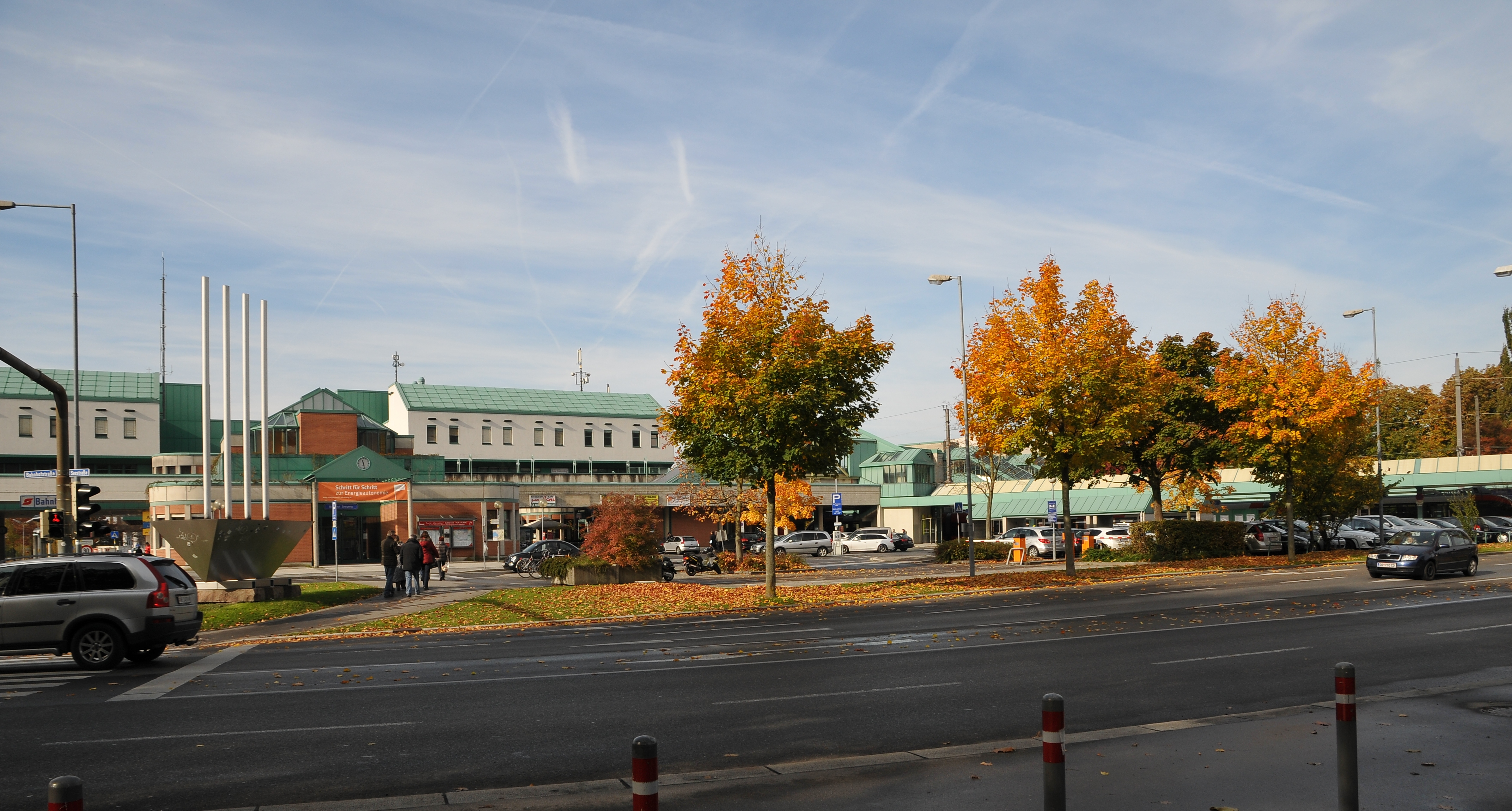 Ausschnitte vom Bregenzer Hauptbahnhof.